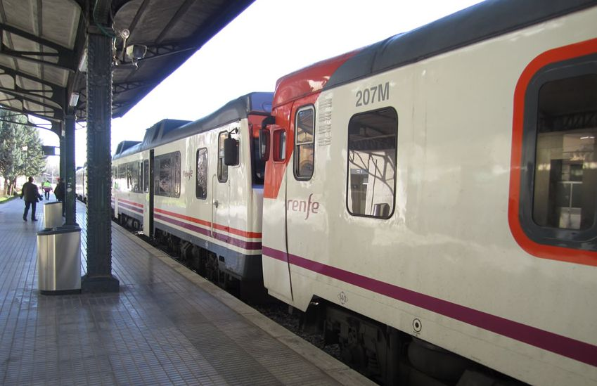 El pasado jueves 27 de diciembre a la llegada del Regional S-592 a la estación de Cuenca procedente de Aranjuez y con destino Valencia se realizaron unas maniobras de acople de otro Regional S-592 que estaba esperándolo en la estación de Cuenca